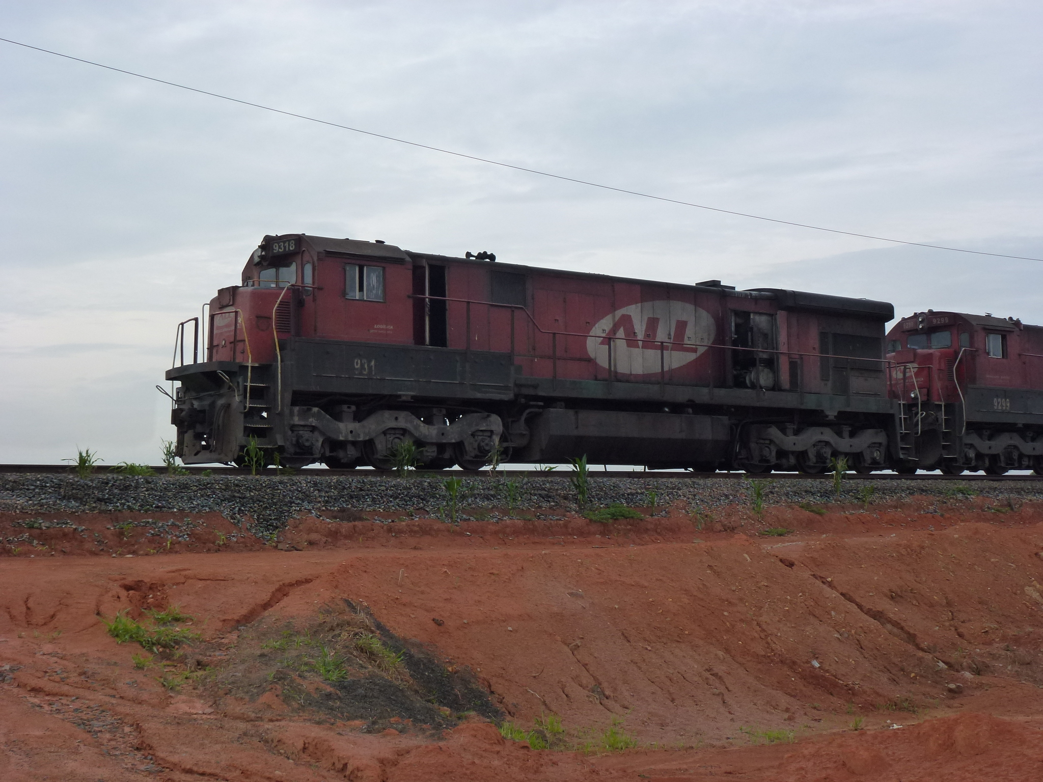 Locomotiva de comboio que passava sentido Boa Vista na Variante Boa Vista-Guaianã km 203 em Itu.